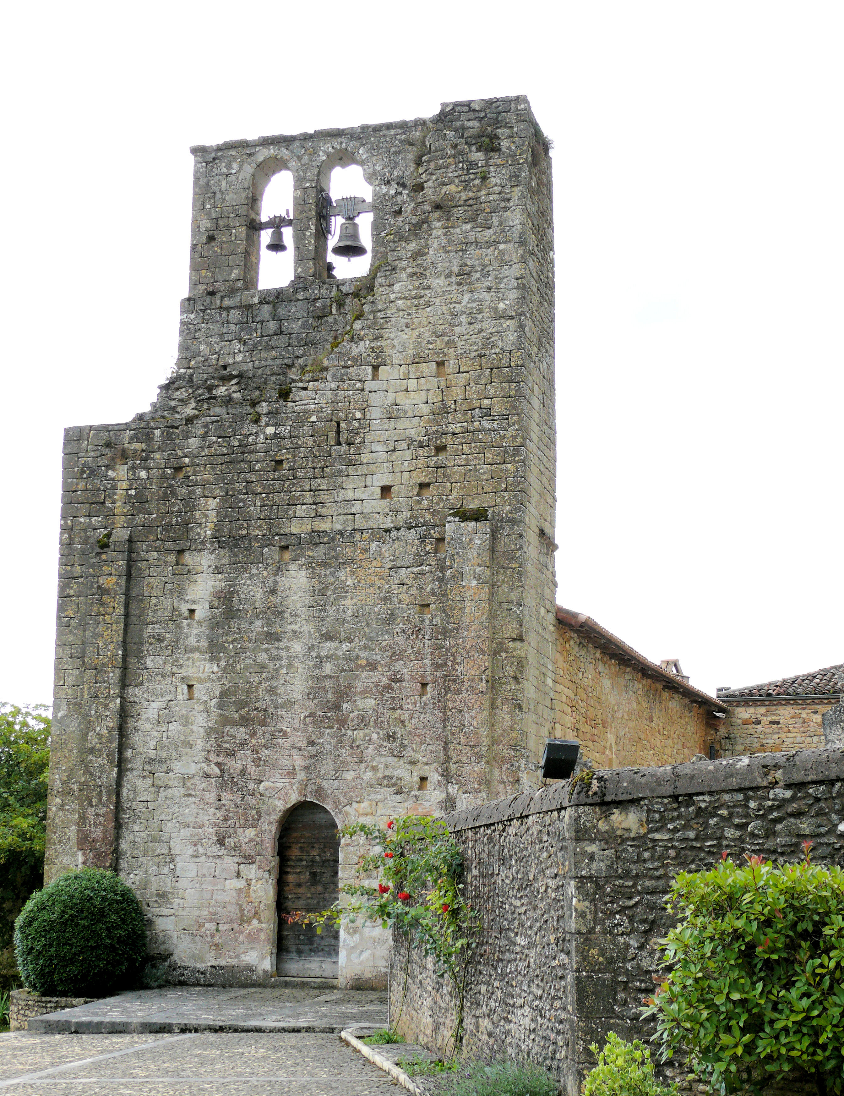 Sainte-Foy-de-Belvès - Eglise Sainte-Foy-d'Agen